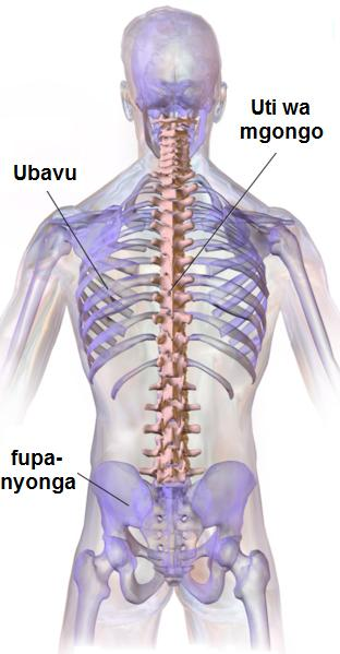 Kiswahili: Uti wa mgongo, ubavu na fupanyonga - ni file:Human_vertebral_column.png iliyoswahilishwa